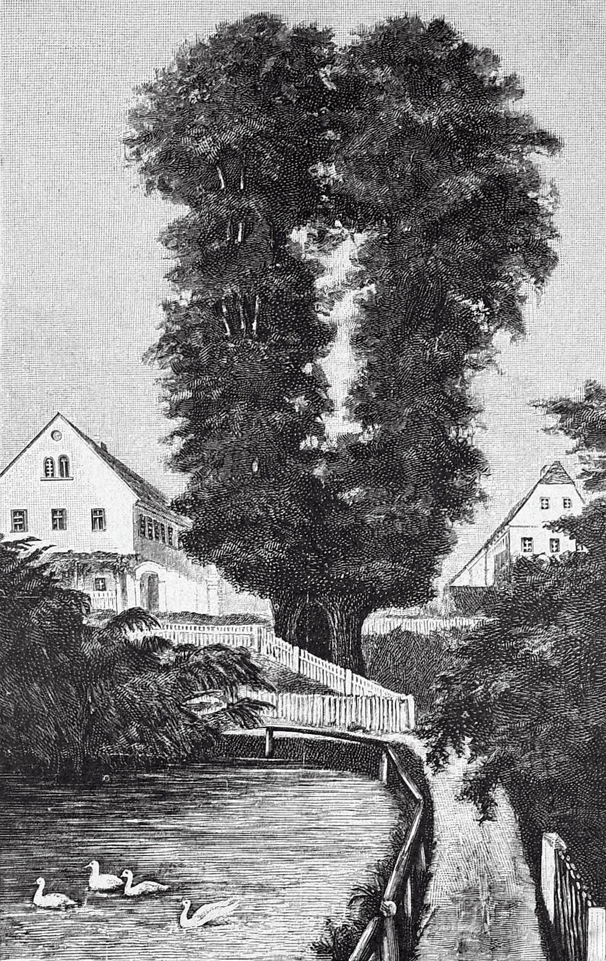 Schmorsdorfer Linde